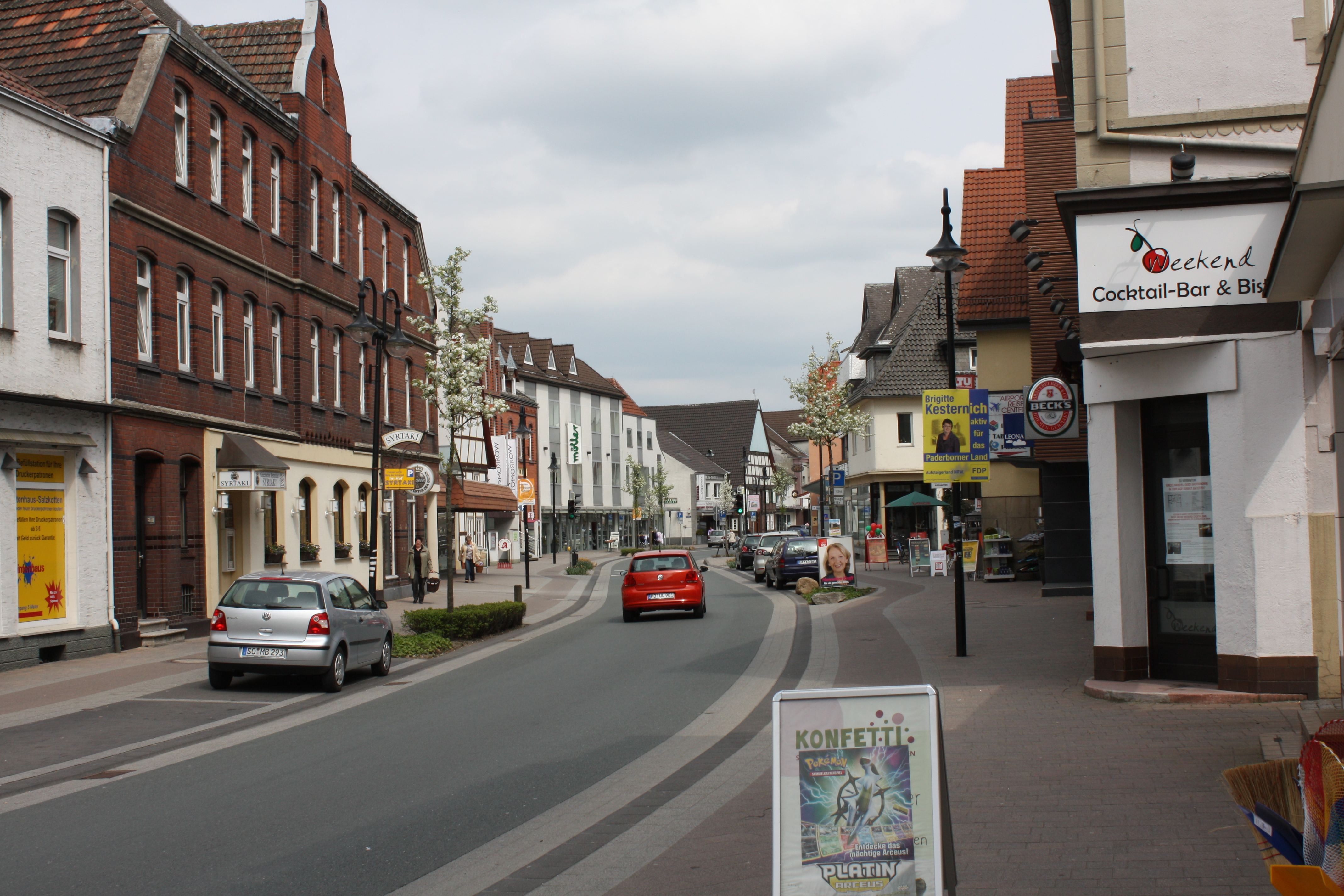 Straße in Salzkotten